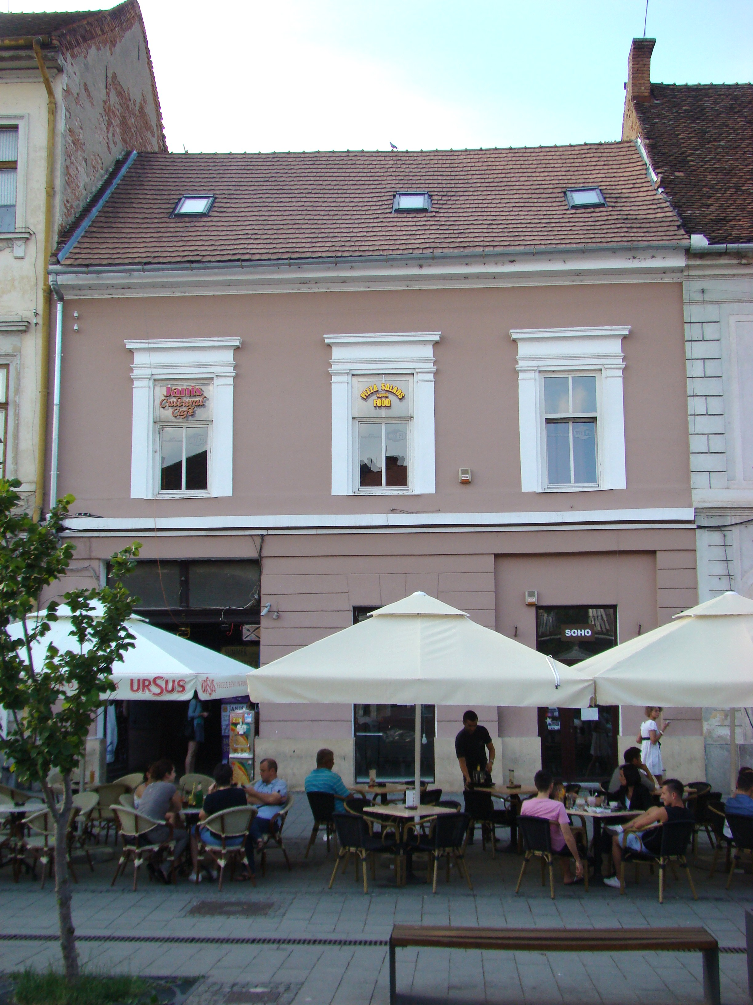 Clădire monument istoric, Bd.Eroilor, nr. 5